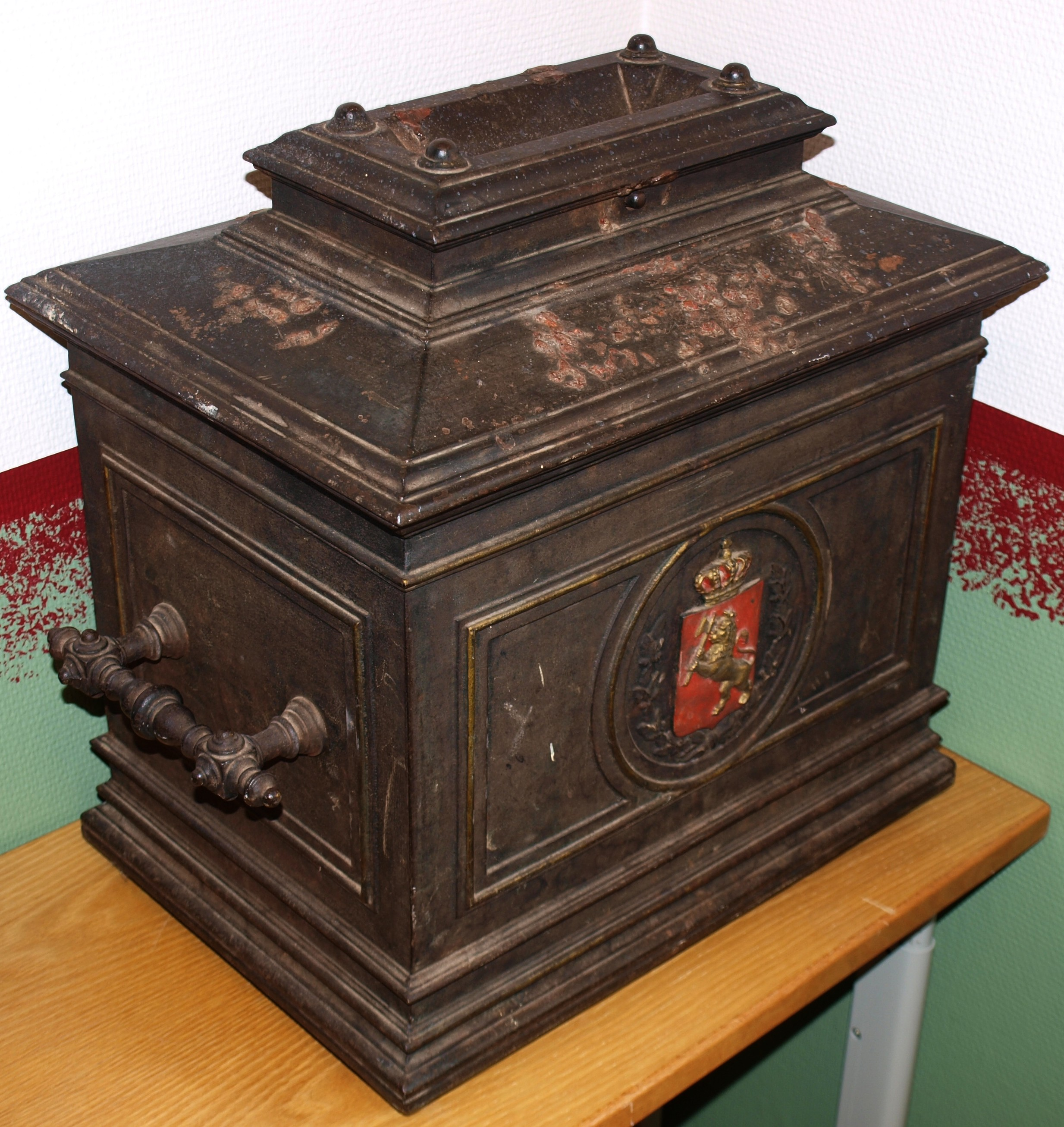 Biblioteket og servicekontoret på Tustna: Stemmeurne frå den tidlegare Tustna kommune, sidan 01.01.2006 innlemma i Aure kommune.